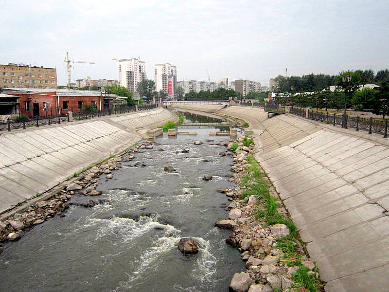 Красноярск. Река Кача.